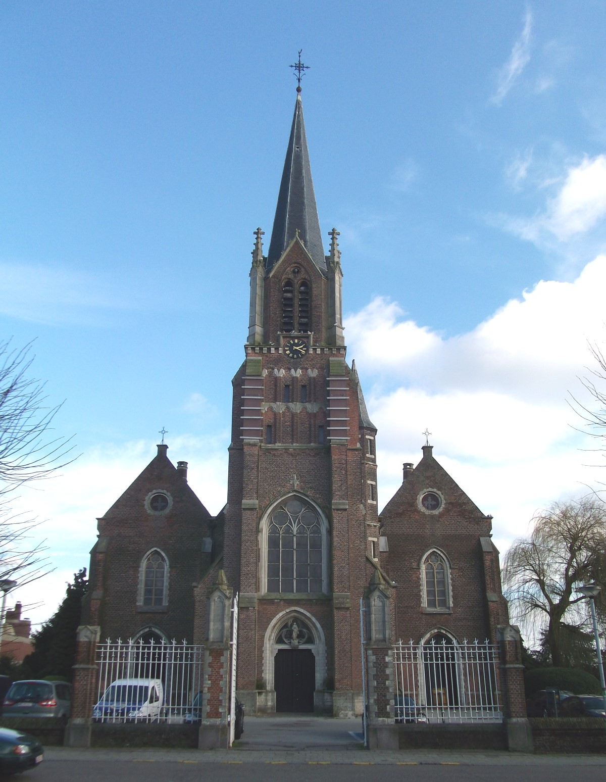 Sint Cordula kerk in Schoten, België